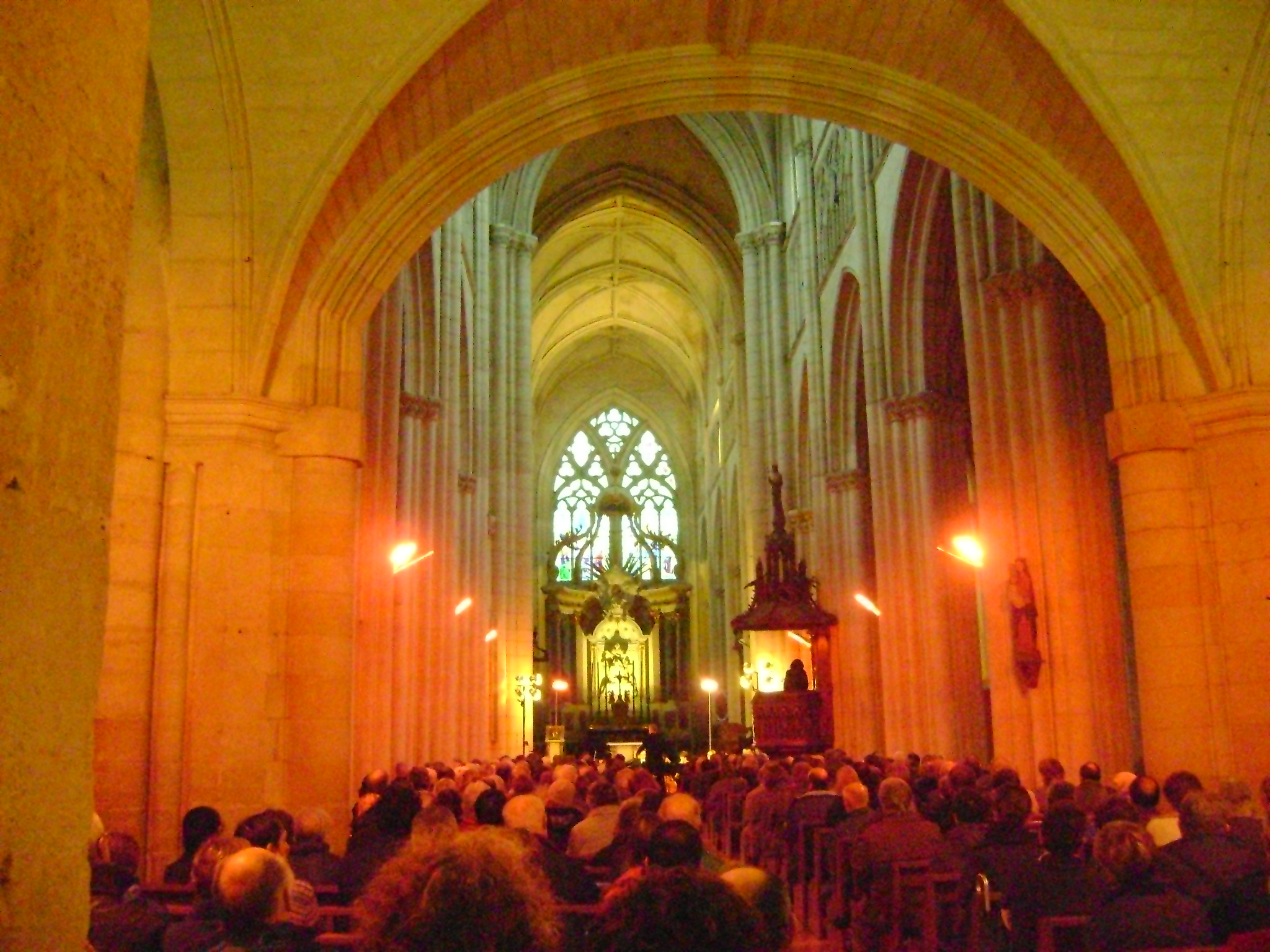 Cathédrale Notre-Dame-de-l'Assomption de Luçon, Vendée. La nef. .